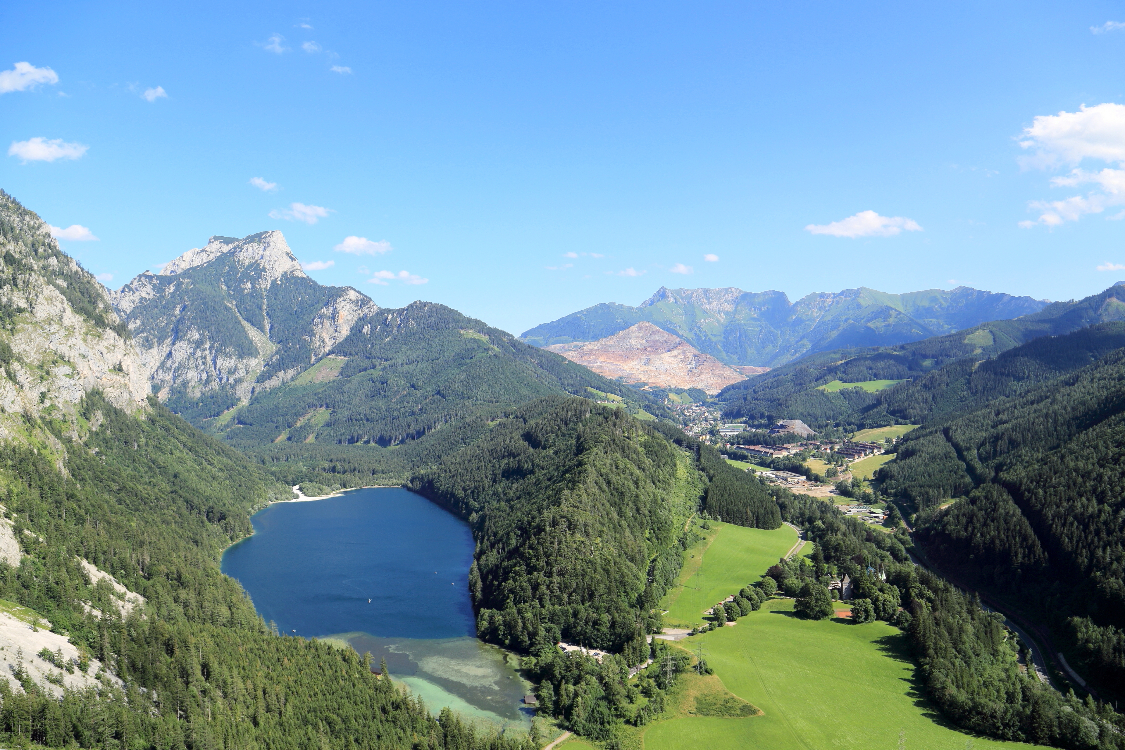 Nordwestansicht des Leopoldsteiner Sees in der österreichischen Gemeinde Eisenerz im steirischen Bezirk Leoben. Hinter dem See der 1871 Meter hohe Pfaffenstein. Leicht Rechts die Stadt Eisenerz mit dem Erzberg und dahinter der 2165 Meter hohe Eisenerzer Reichenstein.